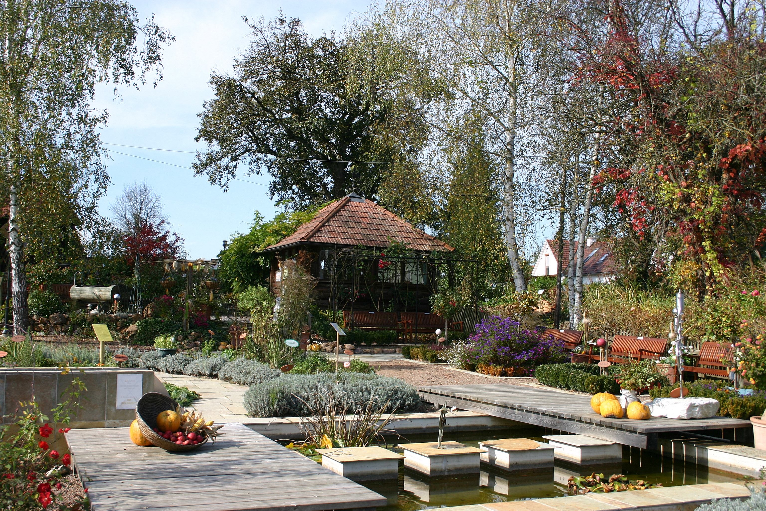 Söchau – Kräutergarten (Bild 1)